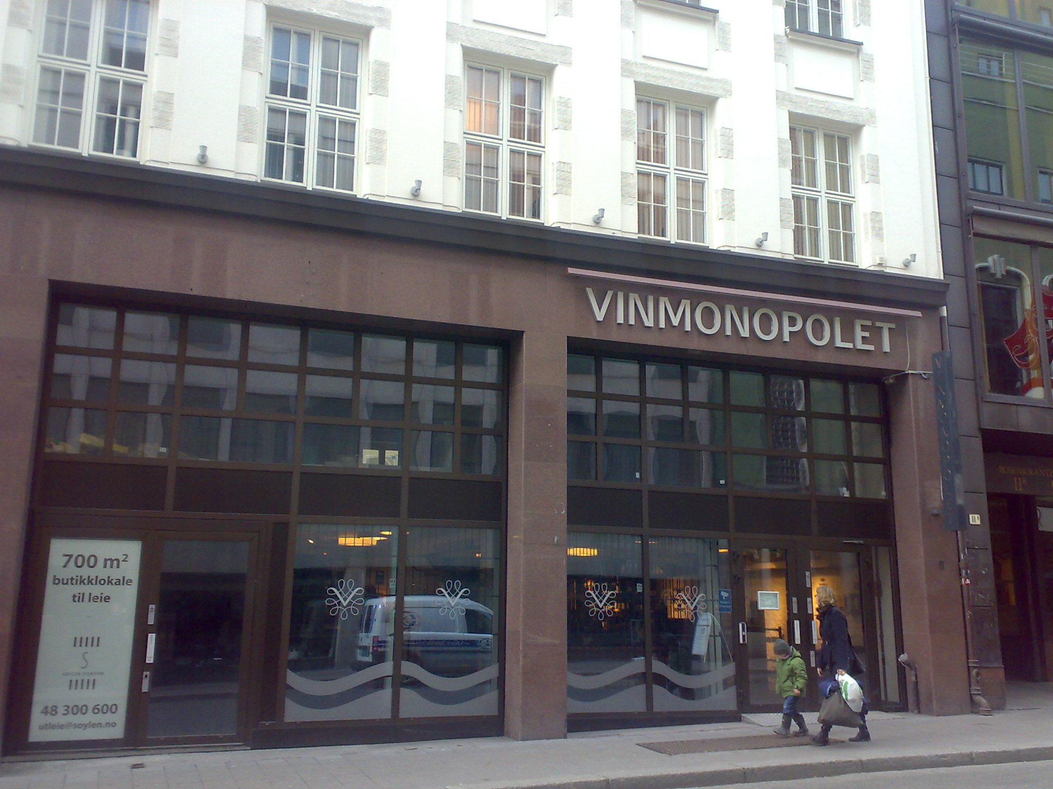 Vinmonopolet, Rosenkrantzgate, Oslo, Norway